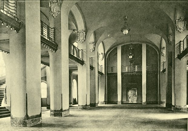 Politechnika Gdańska, hol Gmachu Głównego (parter).